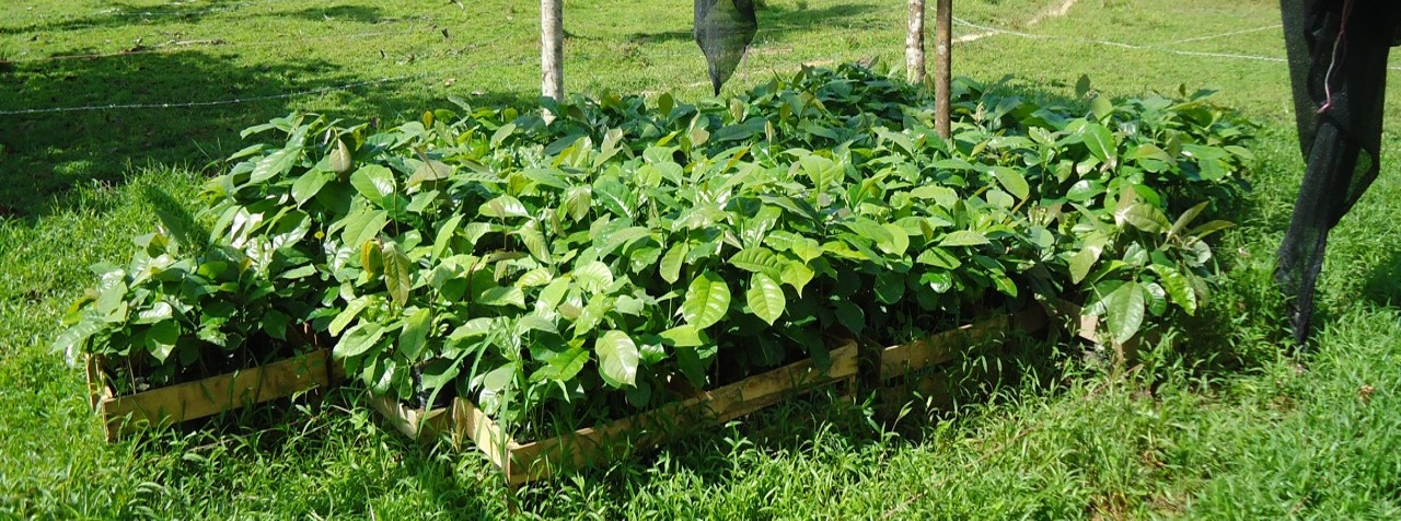 mudas de magnolia silvioi